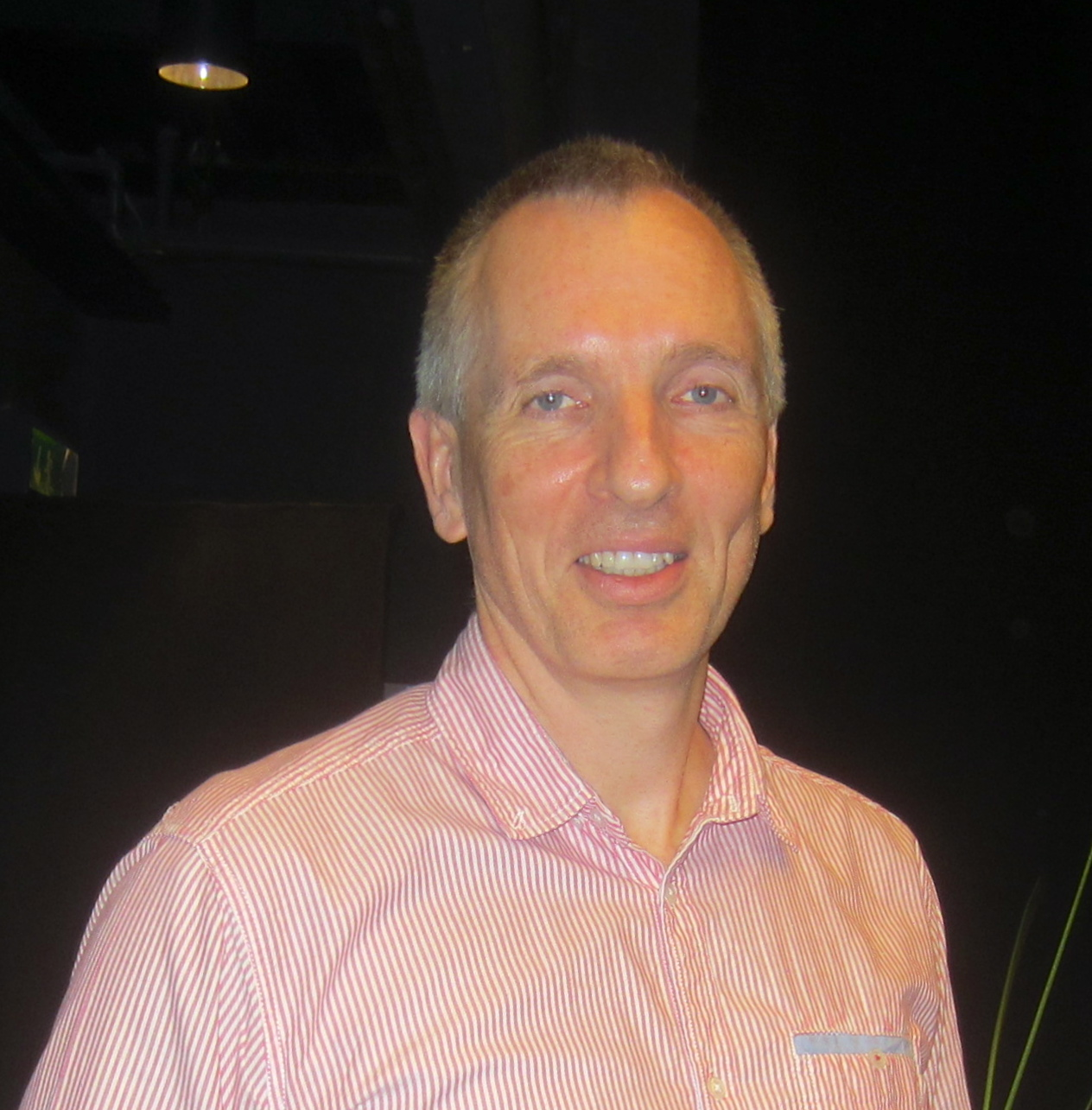 Operasångare Åke Zetterström.